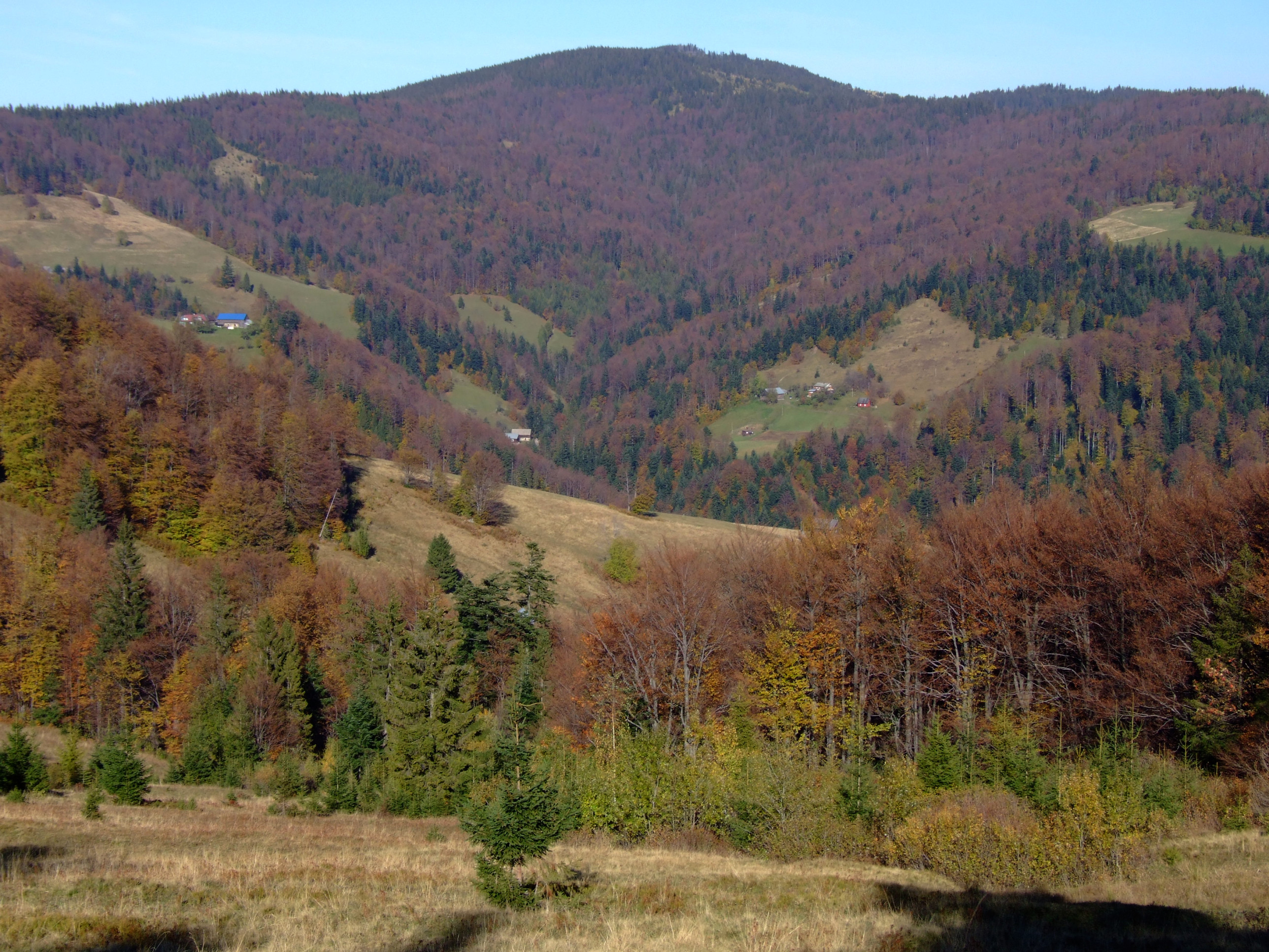 Gorc (Gorce). Widok od południowej strony